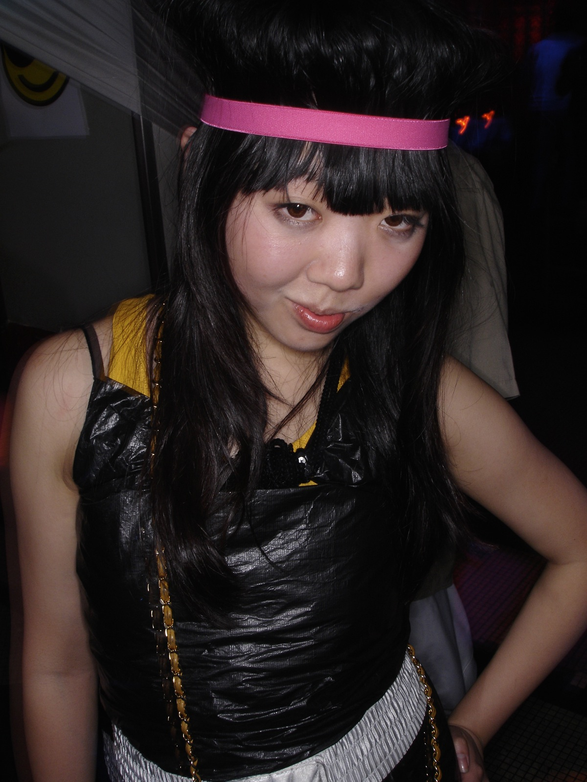 Susie Bubble